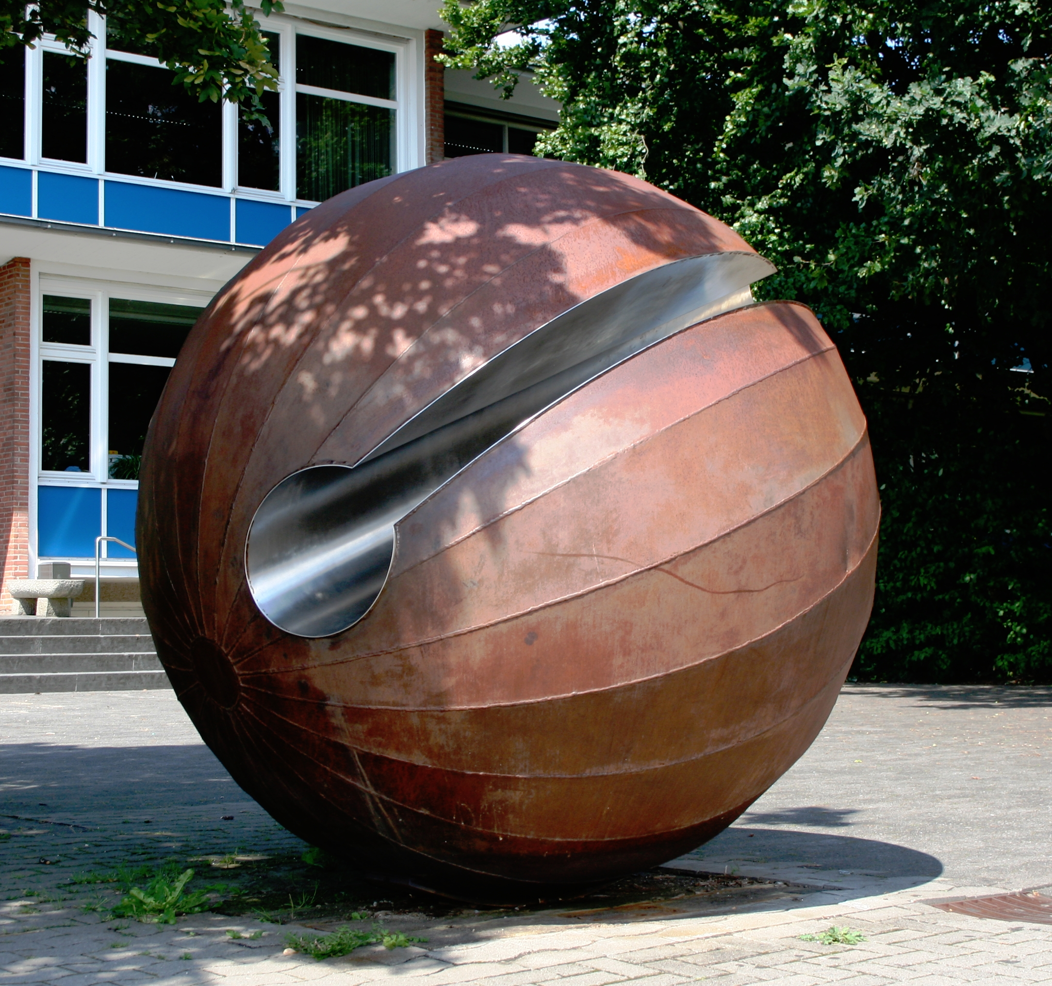 Skulptur "Kugel" vor der Hans-Ehrenberg-Schule in Bielefeld Sennestadt/Germany